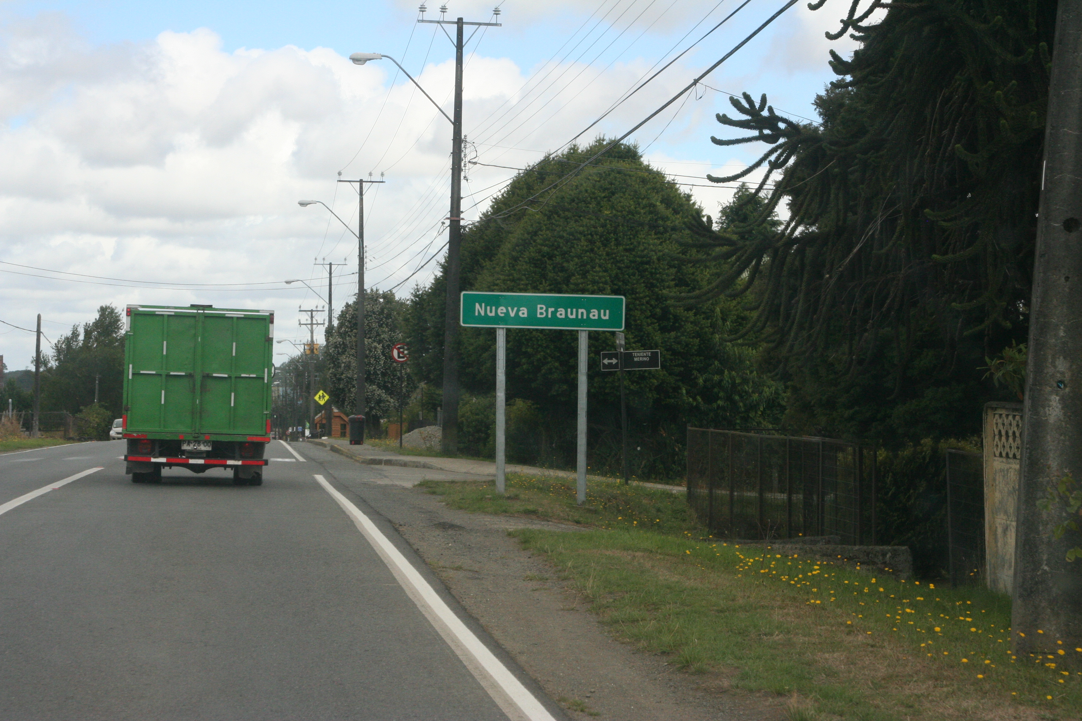 Ortseingang von Nueva Braunau, Region Puerto Varas, Chilie.